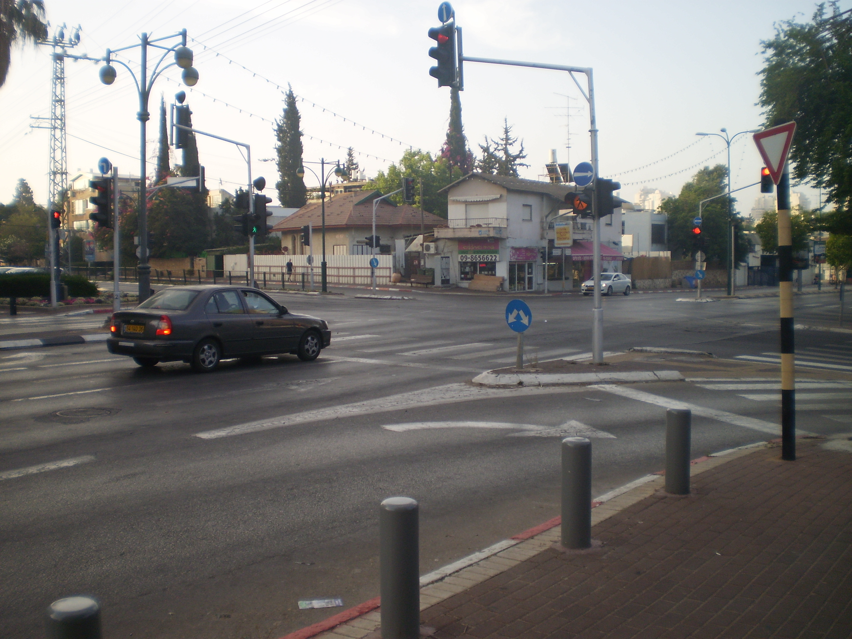 צומת כדורי בשדרות בן גוריון, הרצליה, נקודת המפגש של כביש 482 וכביש 541